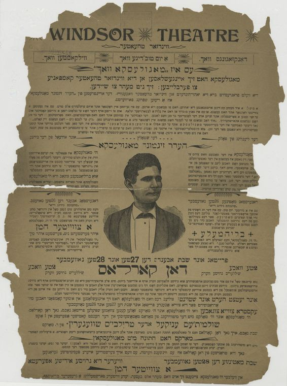 Афиша театра «Виндзор», объявляющая о вхождении Зигмунда Могулеско в его труппу